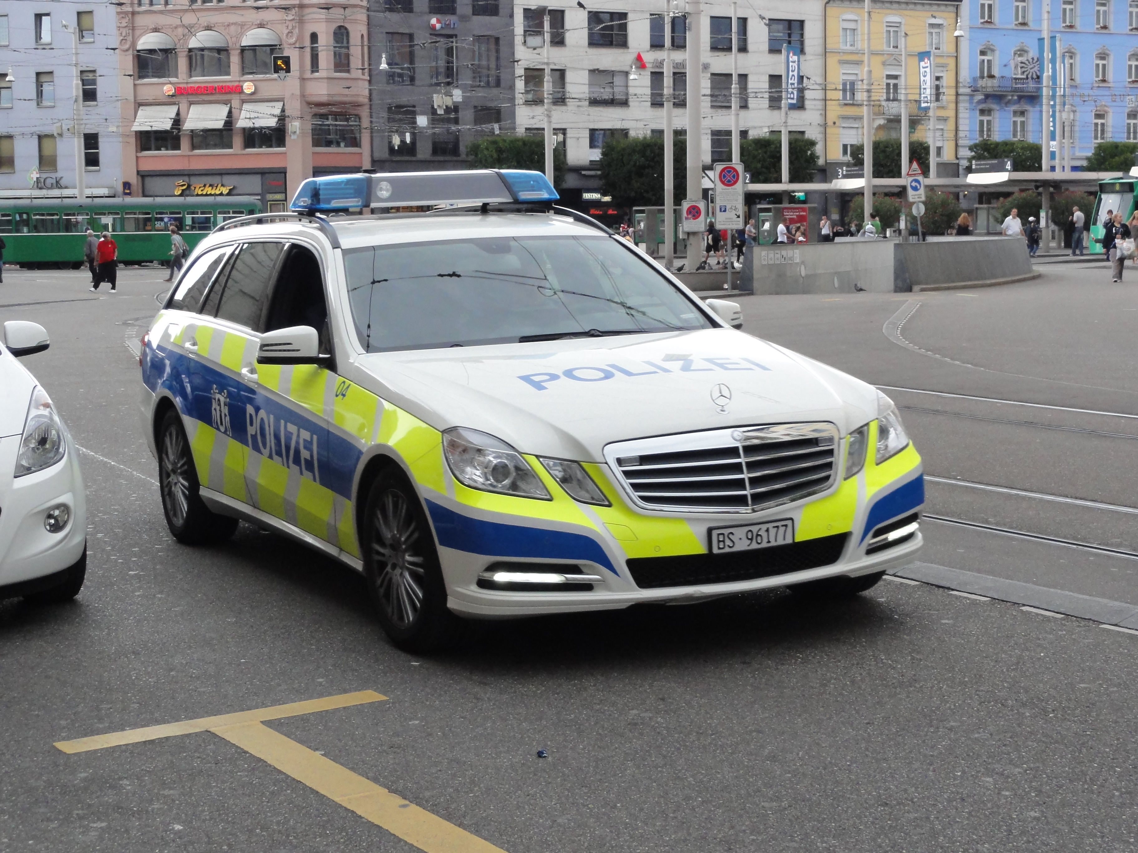 Basel — Einsatzfahrzeug der Polizei des Kantones Basel-Stadt (Mercedes-Benz)